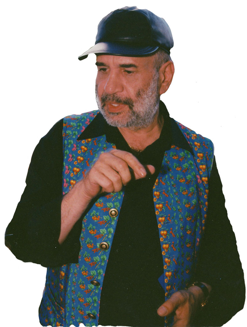 Drafi Deutscher auf der Funkausstellung Berlin